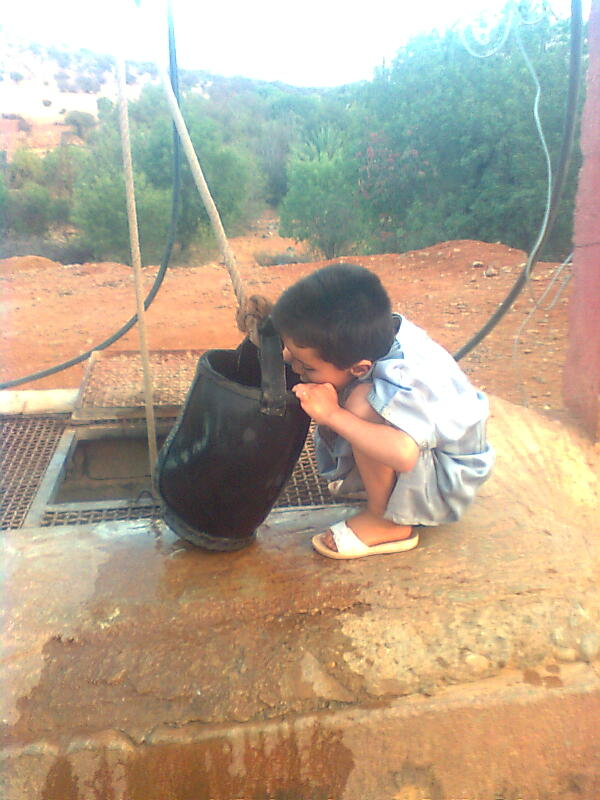 ثقافة مغربية بئر وطفل يشرب من دلو به ماء معدني طبيعي الصورة من كامرا سعيد الجمالي متاحة للإستخدام الحر بالمجان برخصة المشاع الإبداعي للتواصل معي